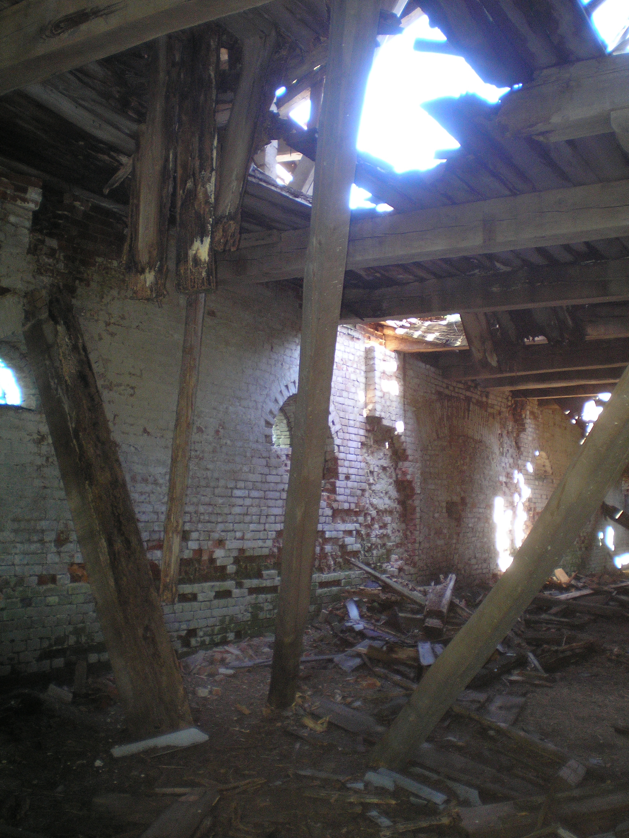 руїни конюшні Рихлівського монастиря